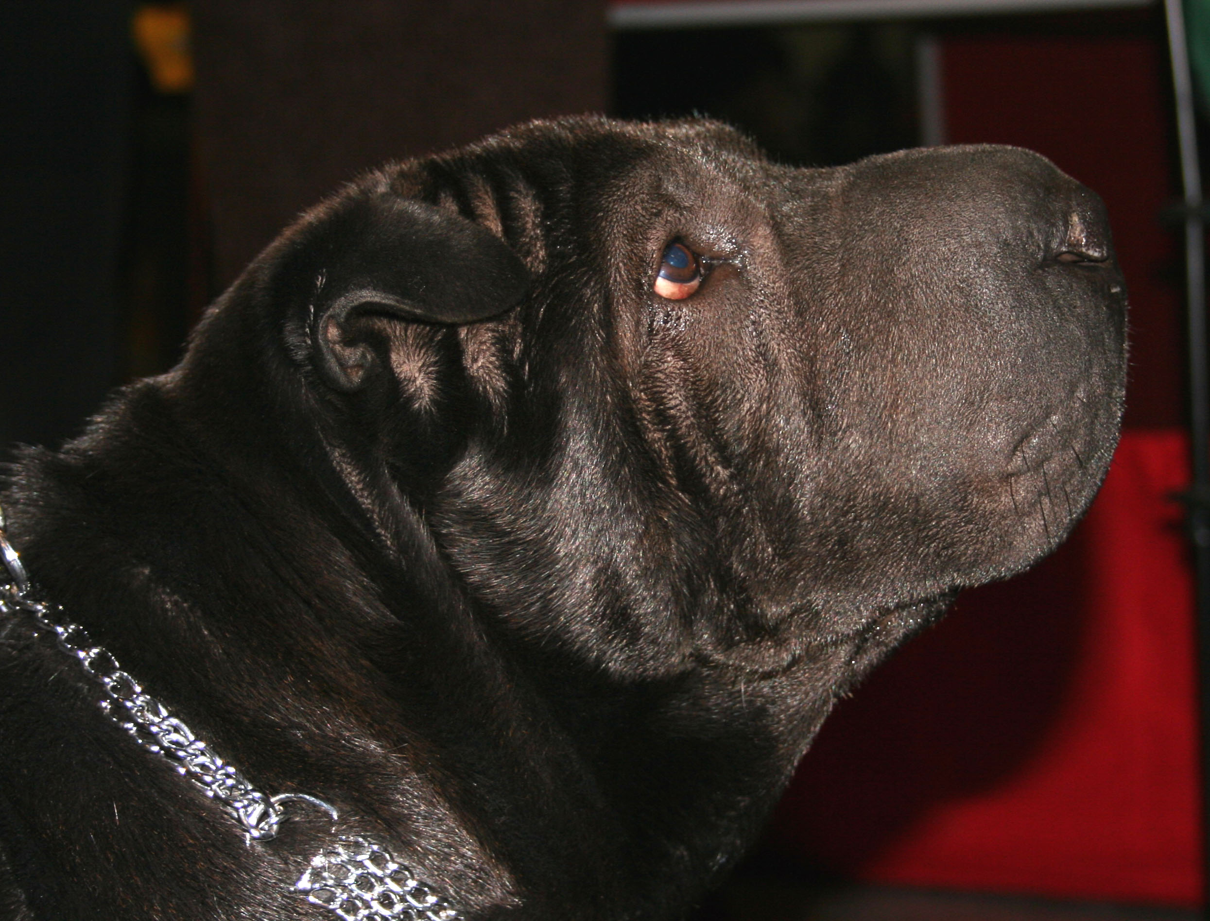 Sharpei na Światowej Wystawie Psów Rasowych w Poznaniu